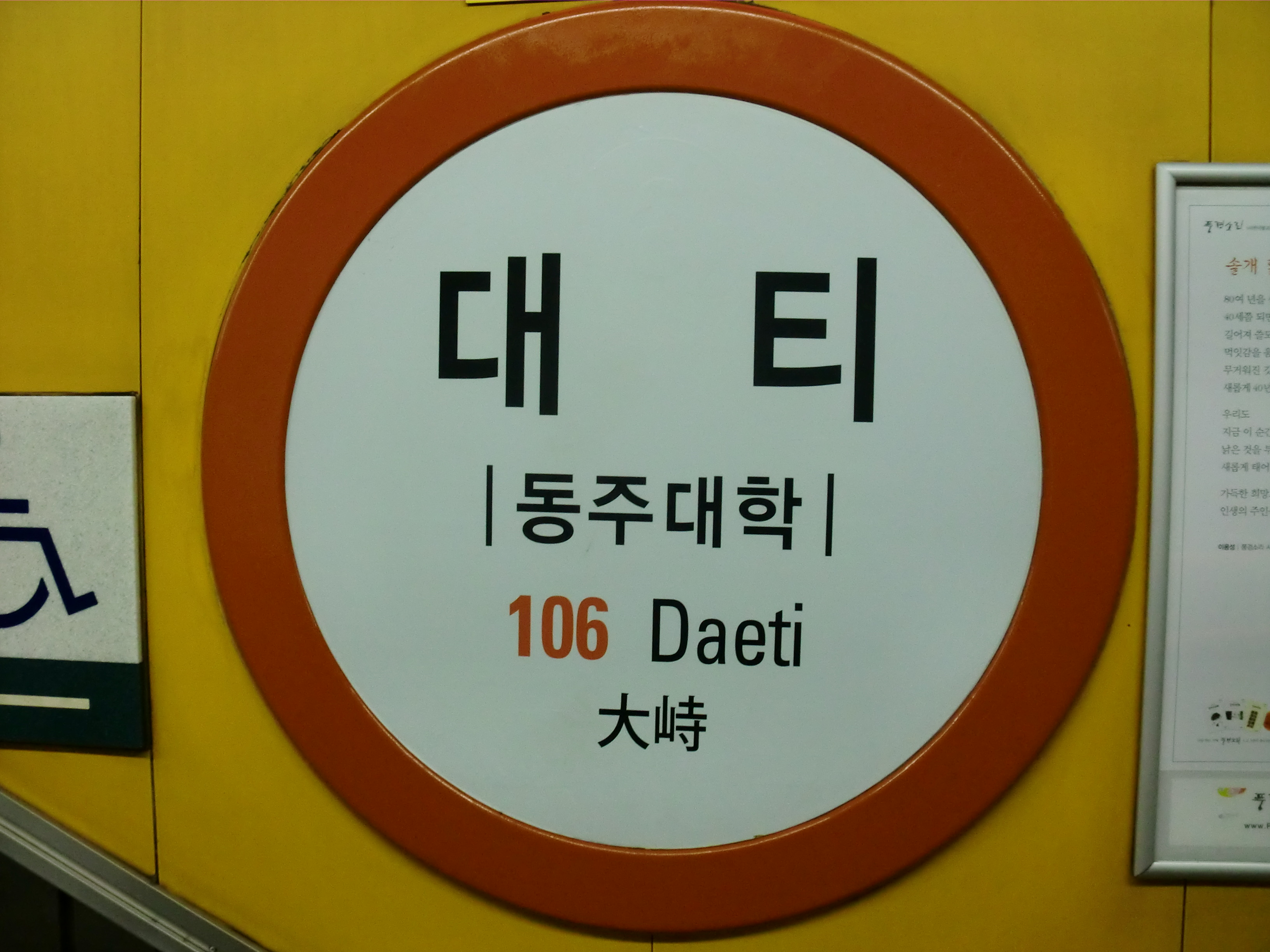 부산도시철도 1호선 대티역의 역명판